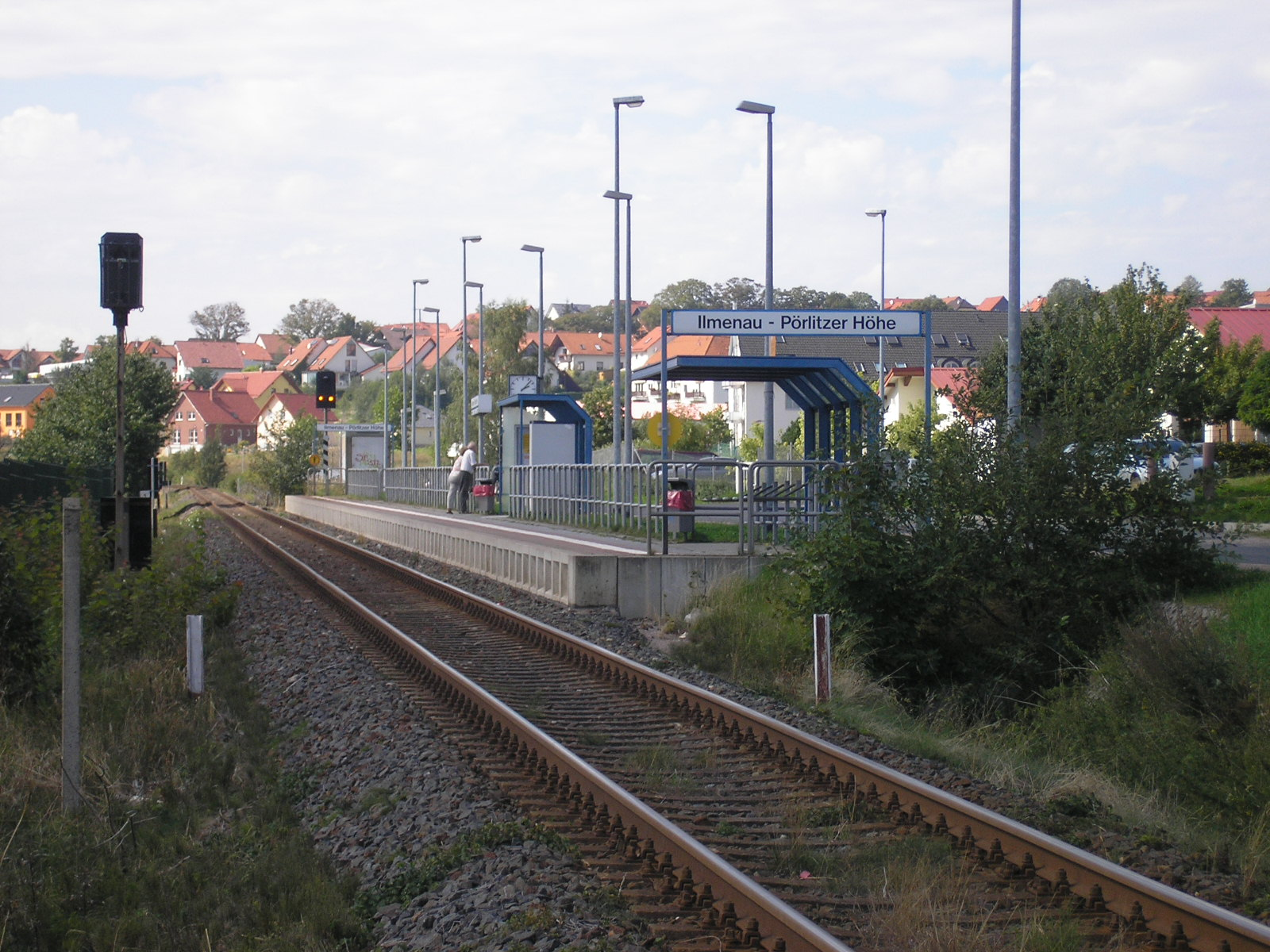 Der Haltepunkt Pörlitzer Höhe in Ilmenau (Thüringen).